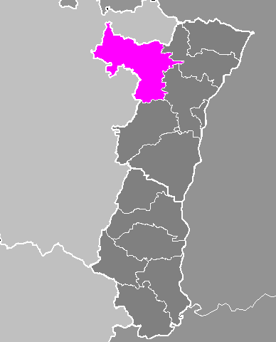 Maps of arrondissements and cantons of France: Arrondissement de Saverne.PNG (Région Alsace)